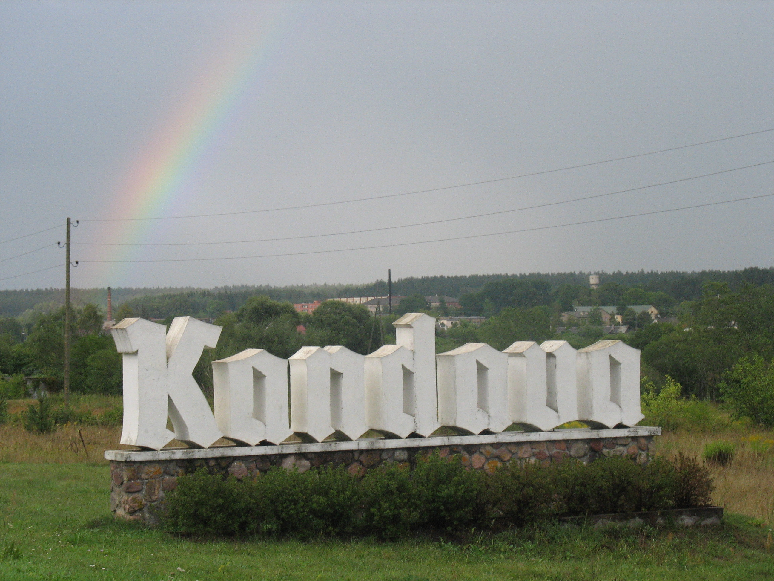 Sign just before entering Kandava